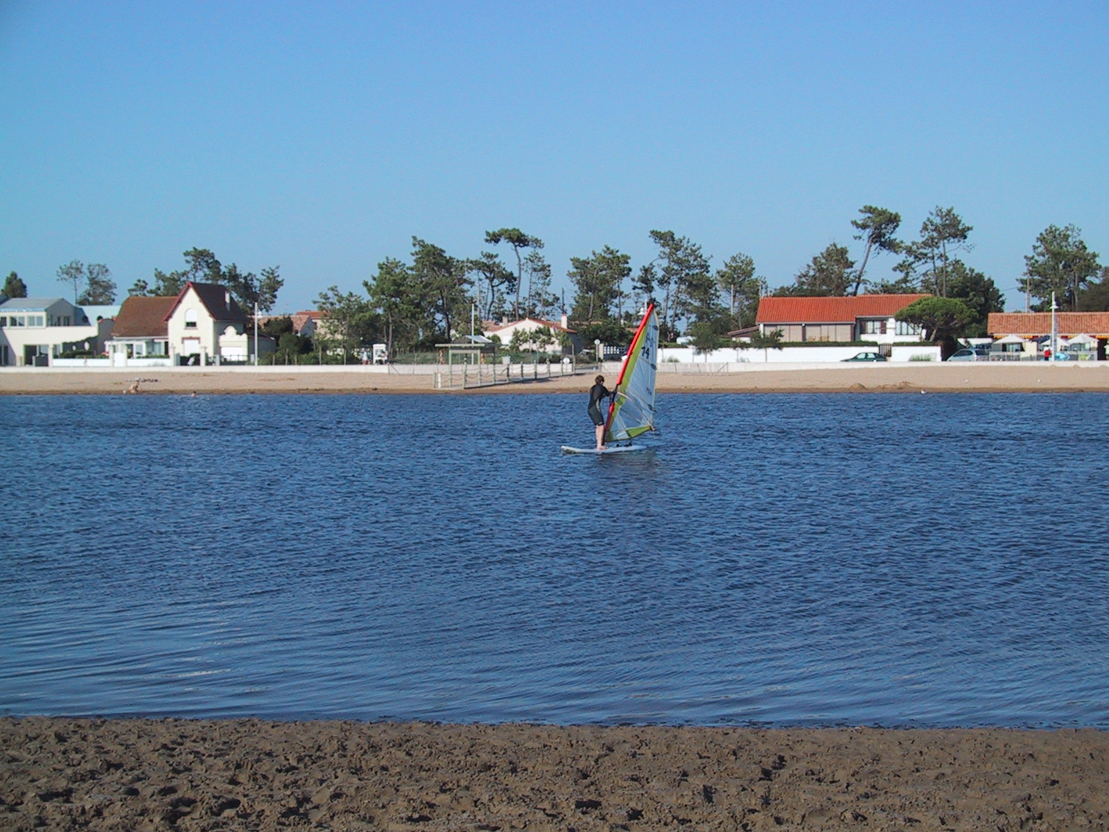 Marennes-plage, Marennes, Charente-Maritime (17), France